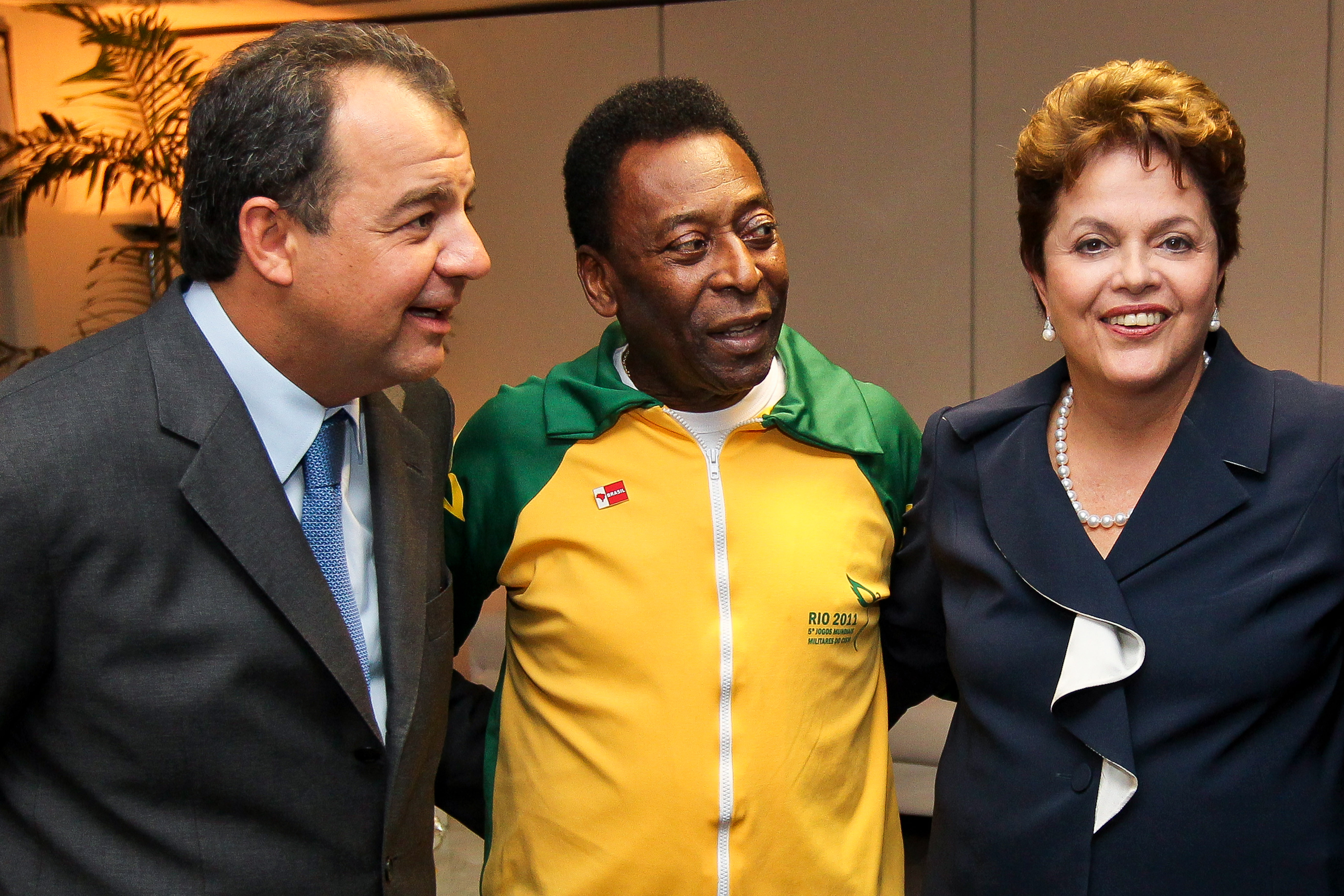 Presidenta Dilma, governador Sérgio Cabral e Pelé por ocasião da cerimônia de abertura dos 5º Jogos Mundiais Militares Rio 2011 (Rio de Janeiro, RJ, 16/07/2011) Foto: Roberto Stuckert Filho/PR